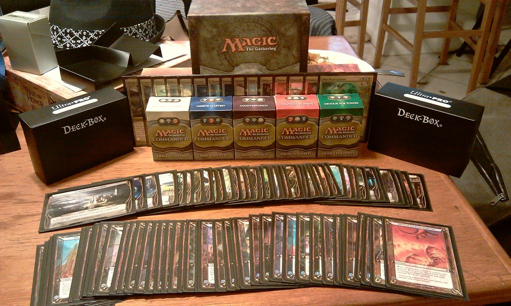 Magic l'assemblée collection